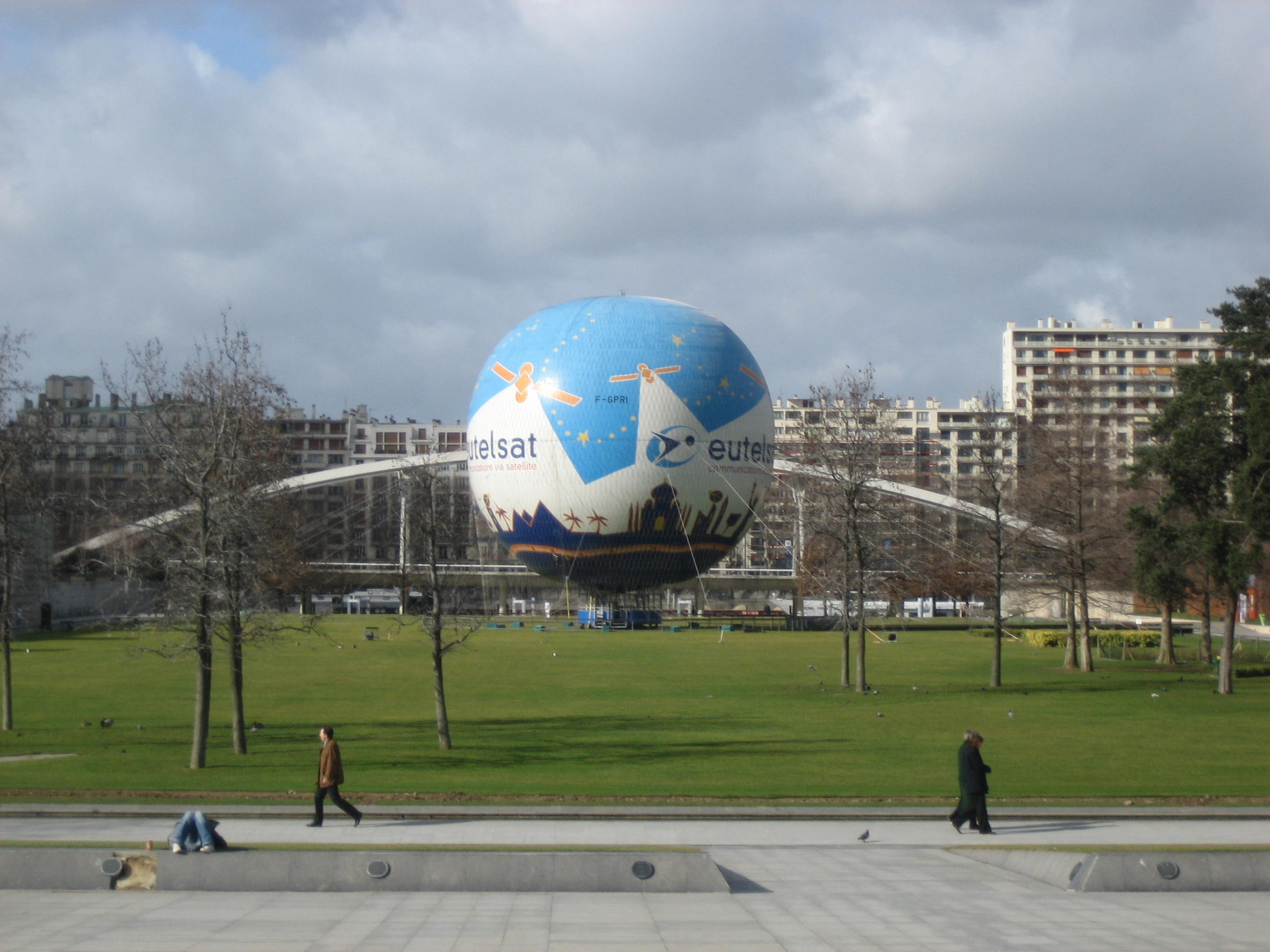 Une photo du ballon captif du parc André-Citroën, dans le 15e arrondissement de Paris.